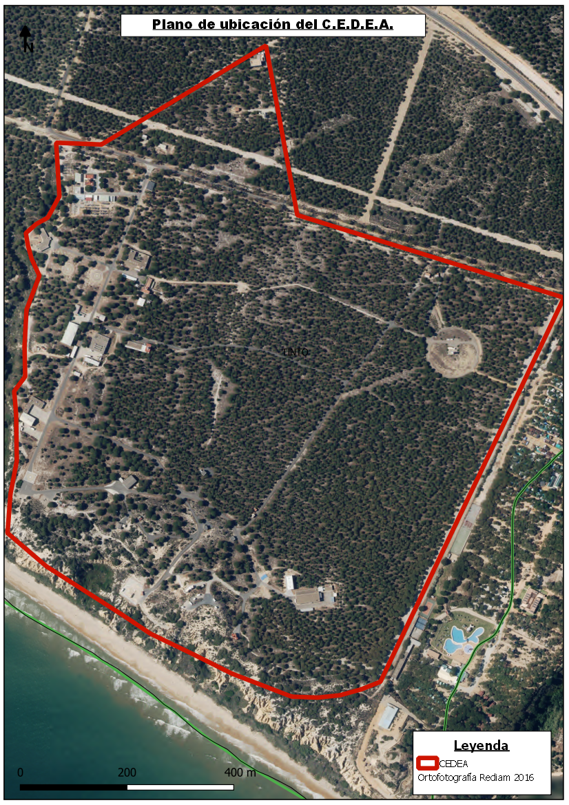 Plano de las instalaciones del C.E.D.E.A. en el termino municipal de Moguer (Andalucia - España)